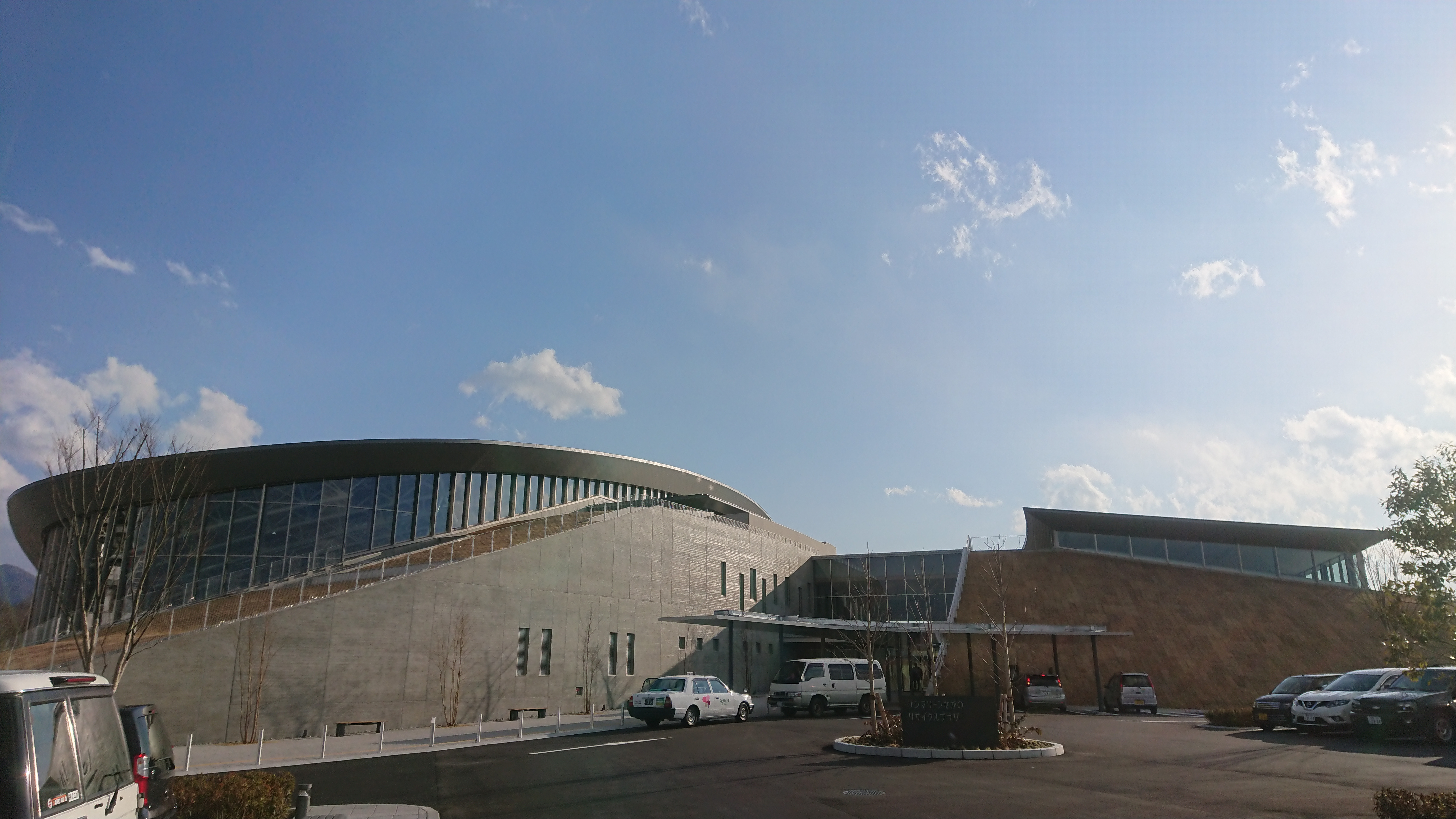 サンマリーンながの（長野県長野市松岡二丁目）